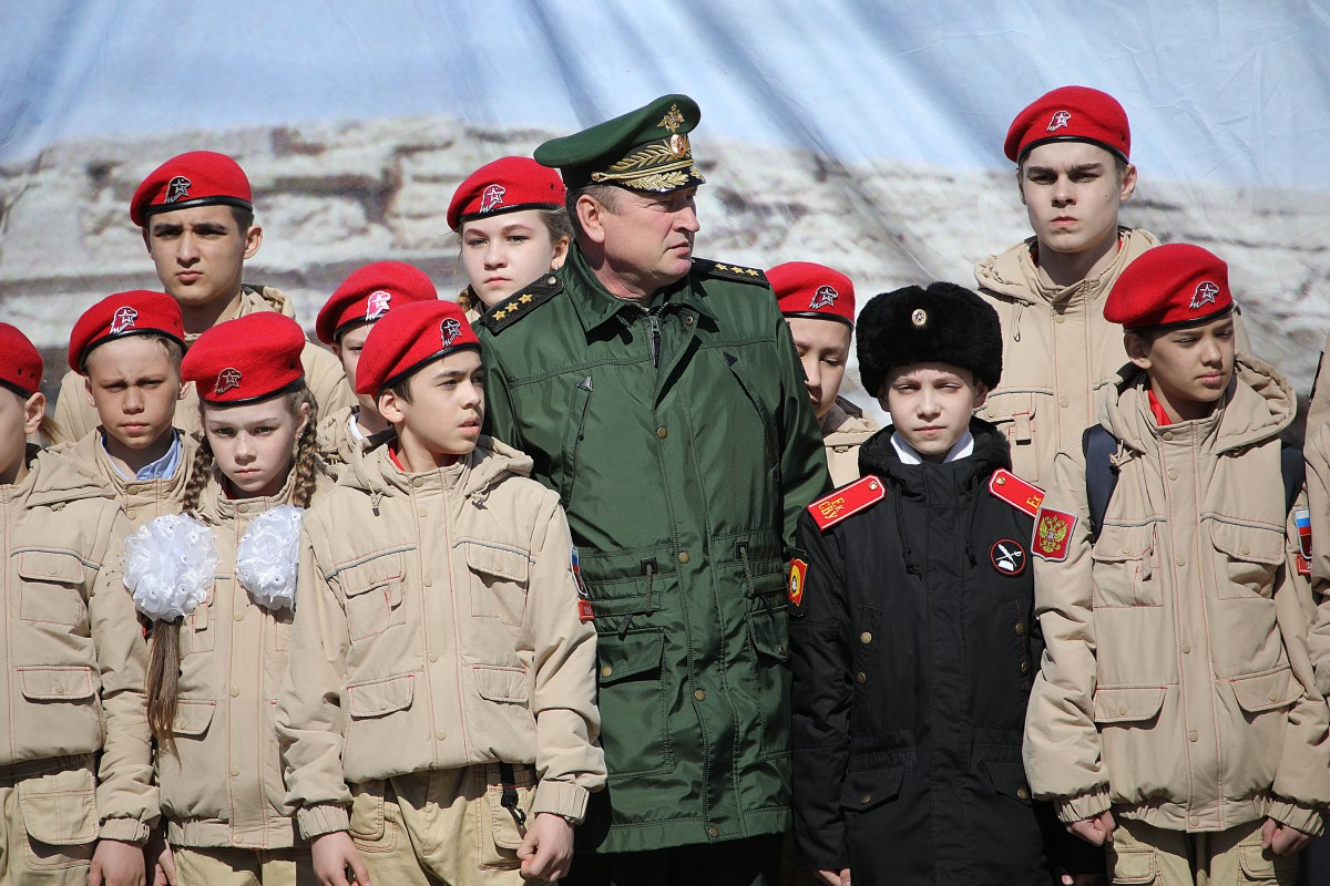 Поезд с экспозицией "Сирийский перелом" прибыл в Екатеринбург